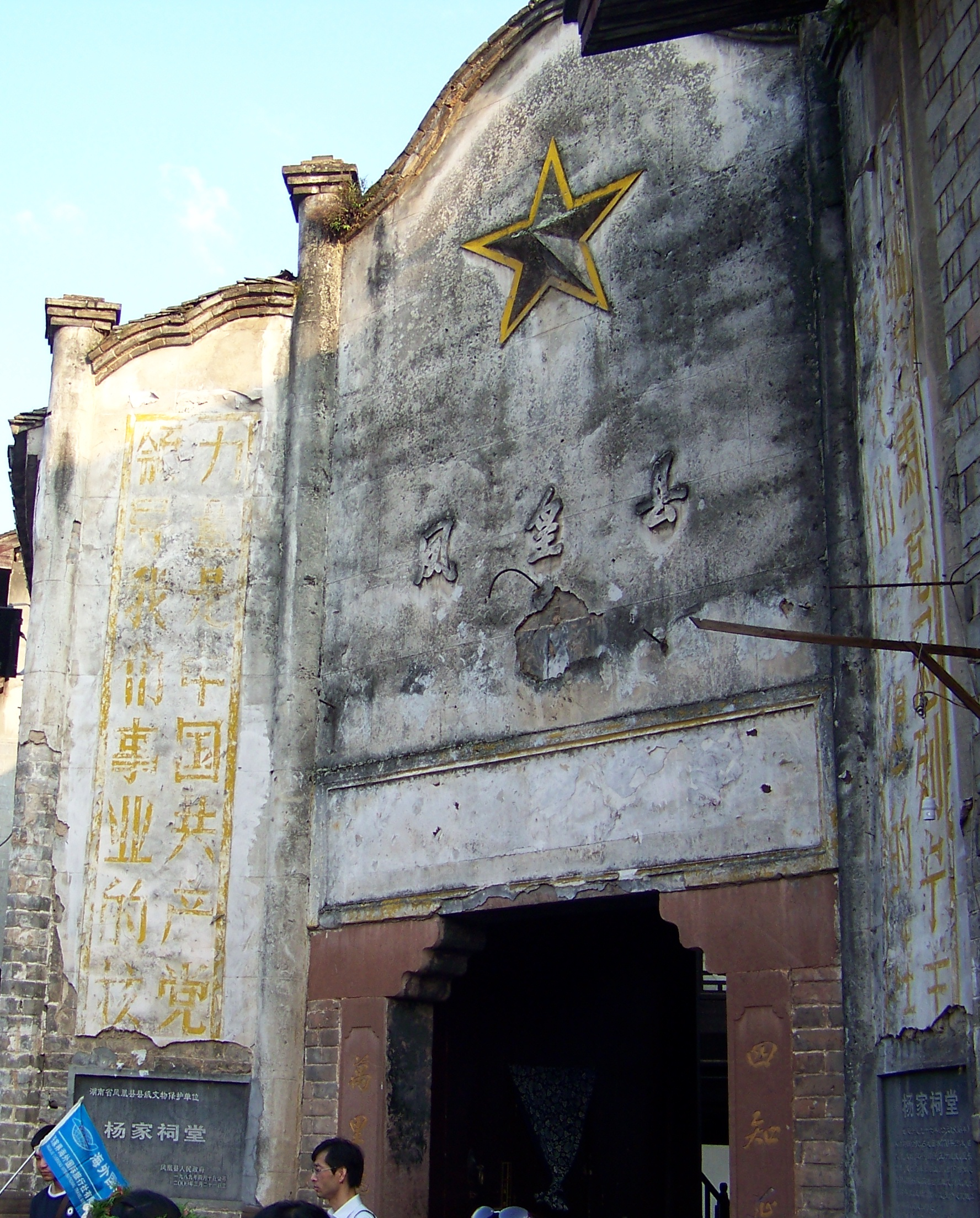 凤凰县田家祠堂，田兴恕损资所建